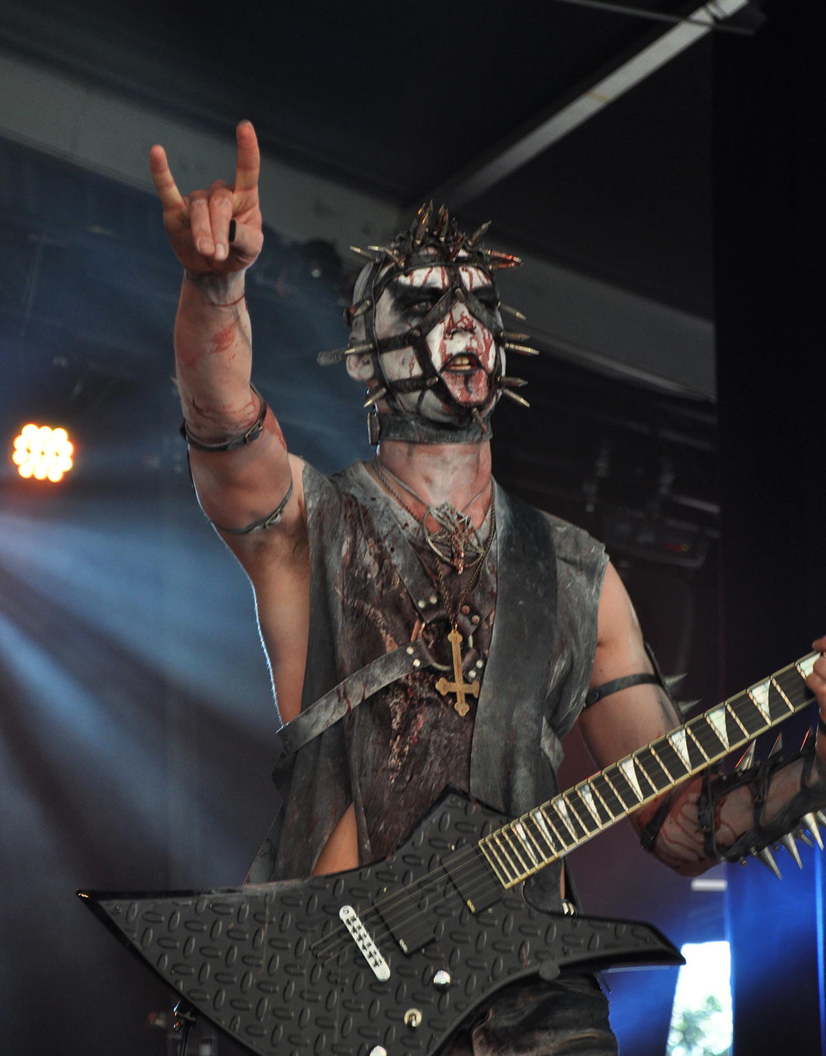 Enzifer, un guitariste d'Urgehal, au Metal Mean Festival, le 20 Août 2011 à Méan (Bel).